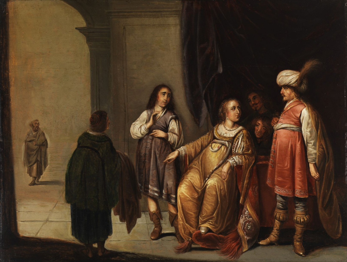 Joseph wird von Potiphars Frau beschuldigt